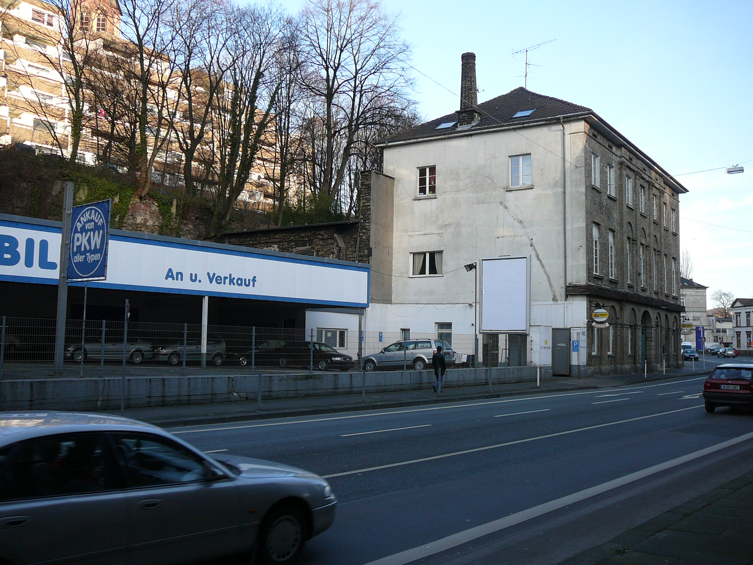 Friedrich-Ebert-Str., Wuppertal